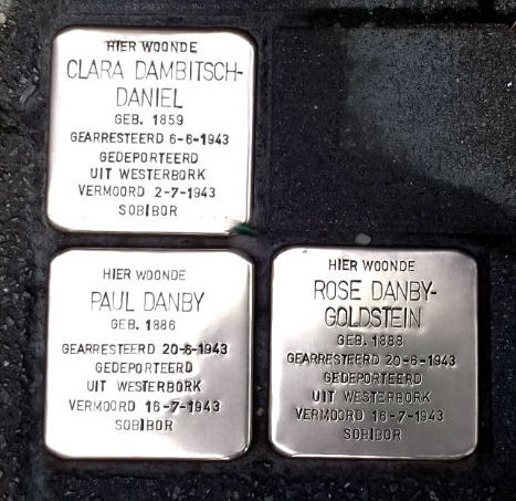 Stolpersteine Veronesestraat 3 Amsterdam für Paul Danby (1886-1943), Rose Danby (1888-1943) und Clara Dambitsch-Daniel (1859-1943)